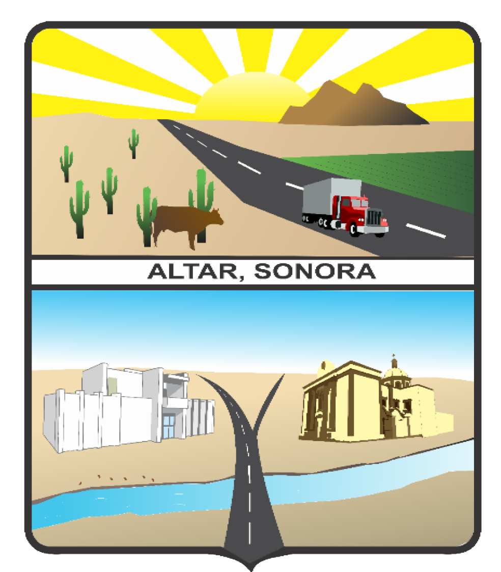 Escudo del municipio sonorense.